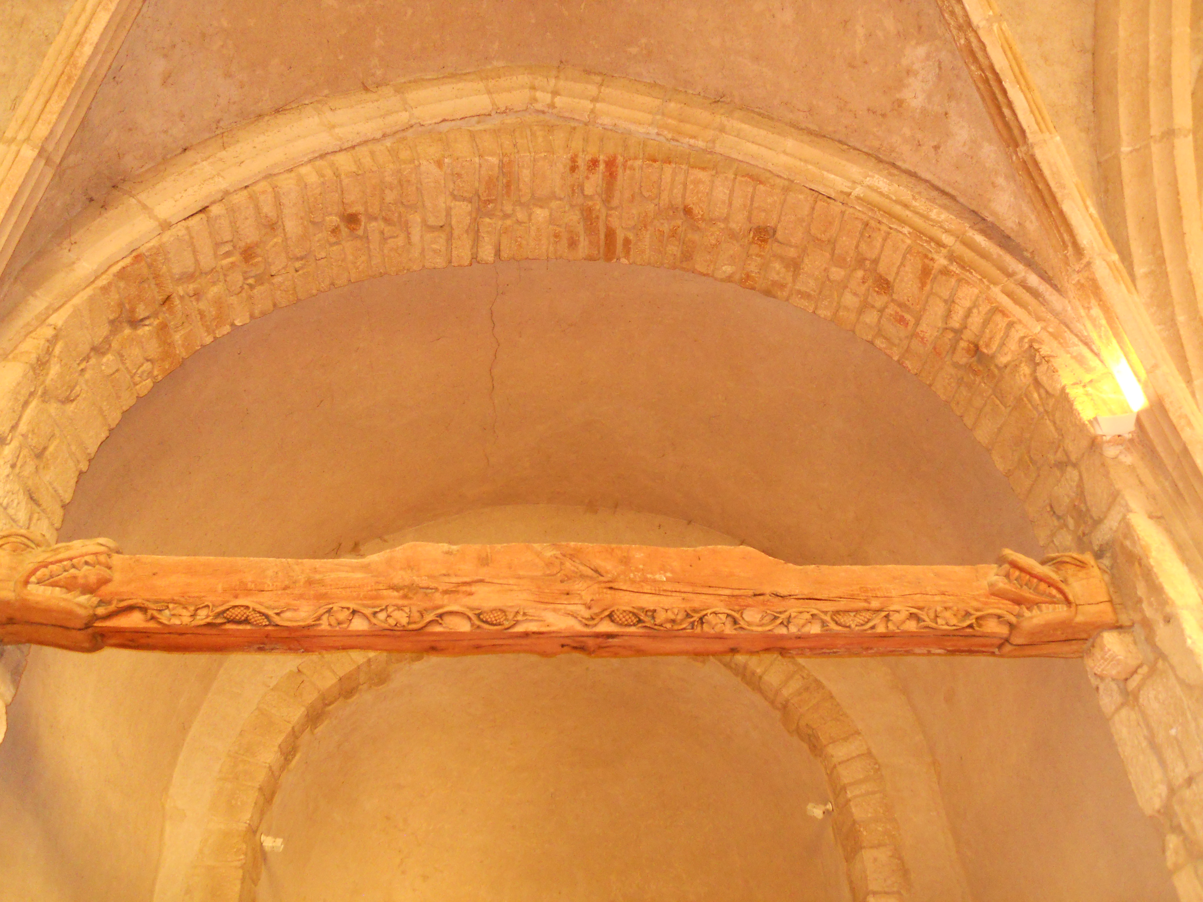 Poutre sculpté prieuré Couches